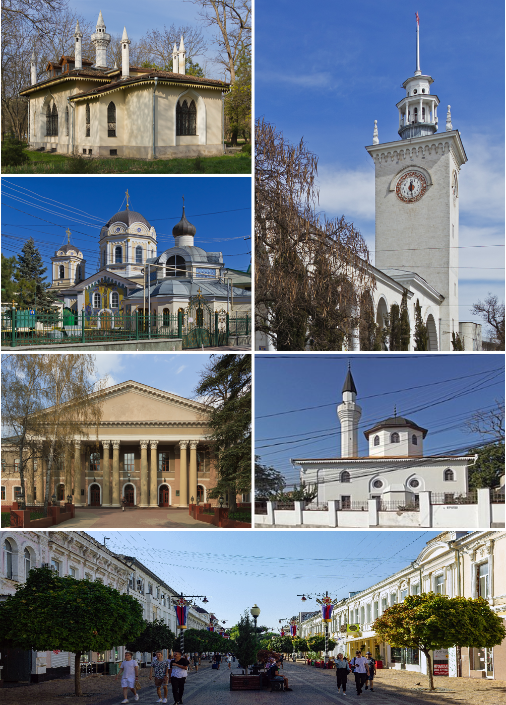 Коллаж из фотографий пользователя A.Savin для статьи о Симферополе